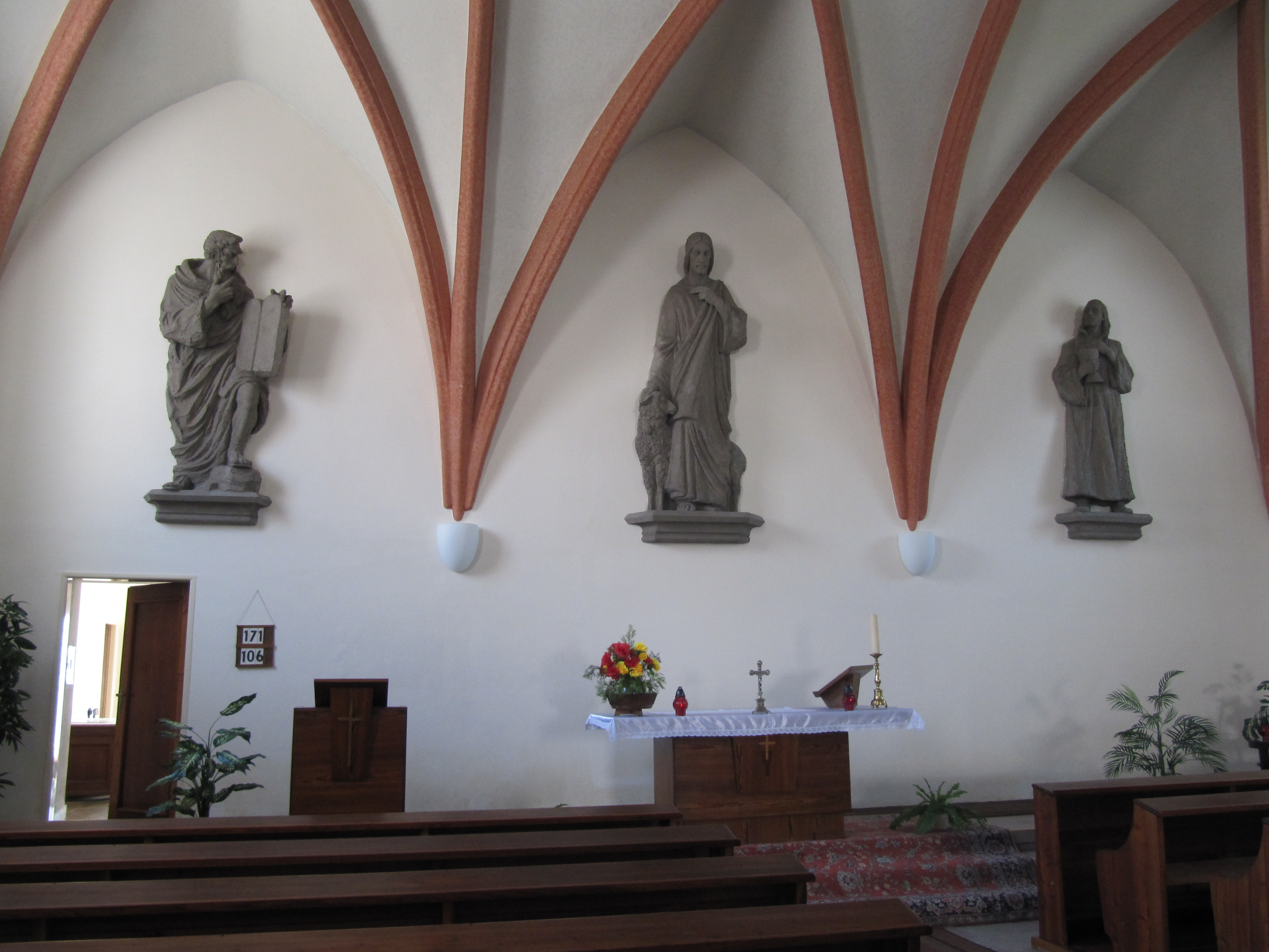 Synagoga - bývalá (Lipník nad Bečvou), Perštýnská, Lipník nad Bečvou